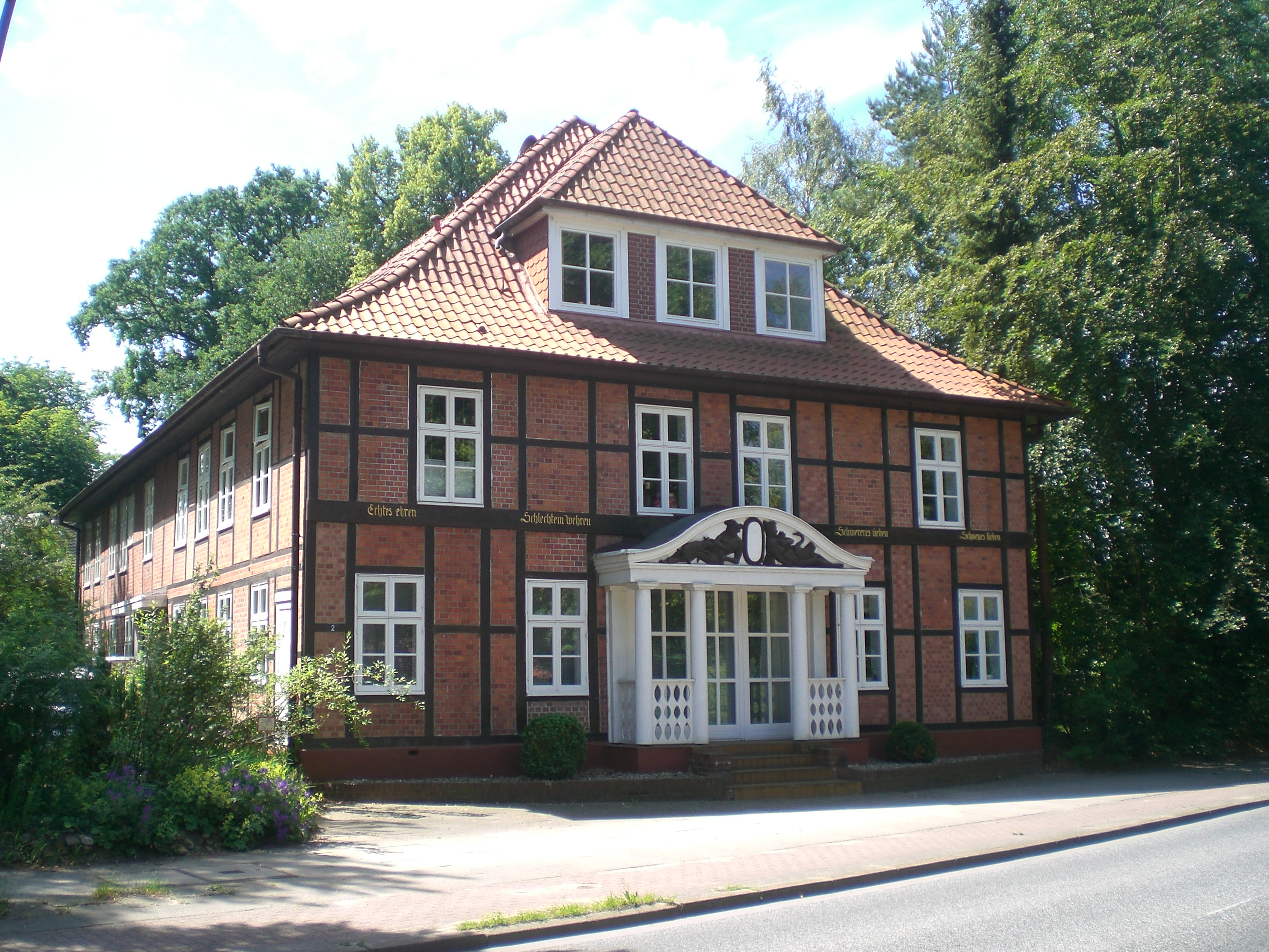 Ehemaliges Schleusenmeisterhaus, Schleusenredder 2, Hamburg-Wohldorf-Ohlstedt This is a photograph of an architectural monument.